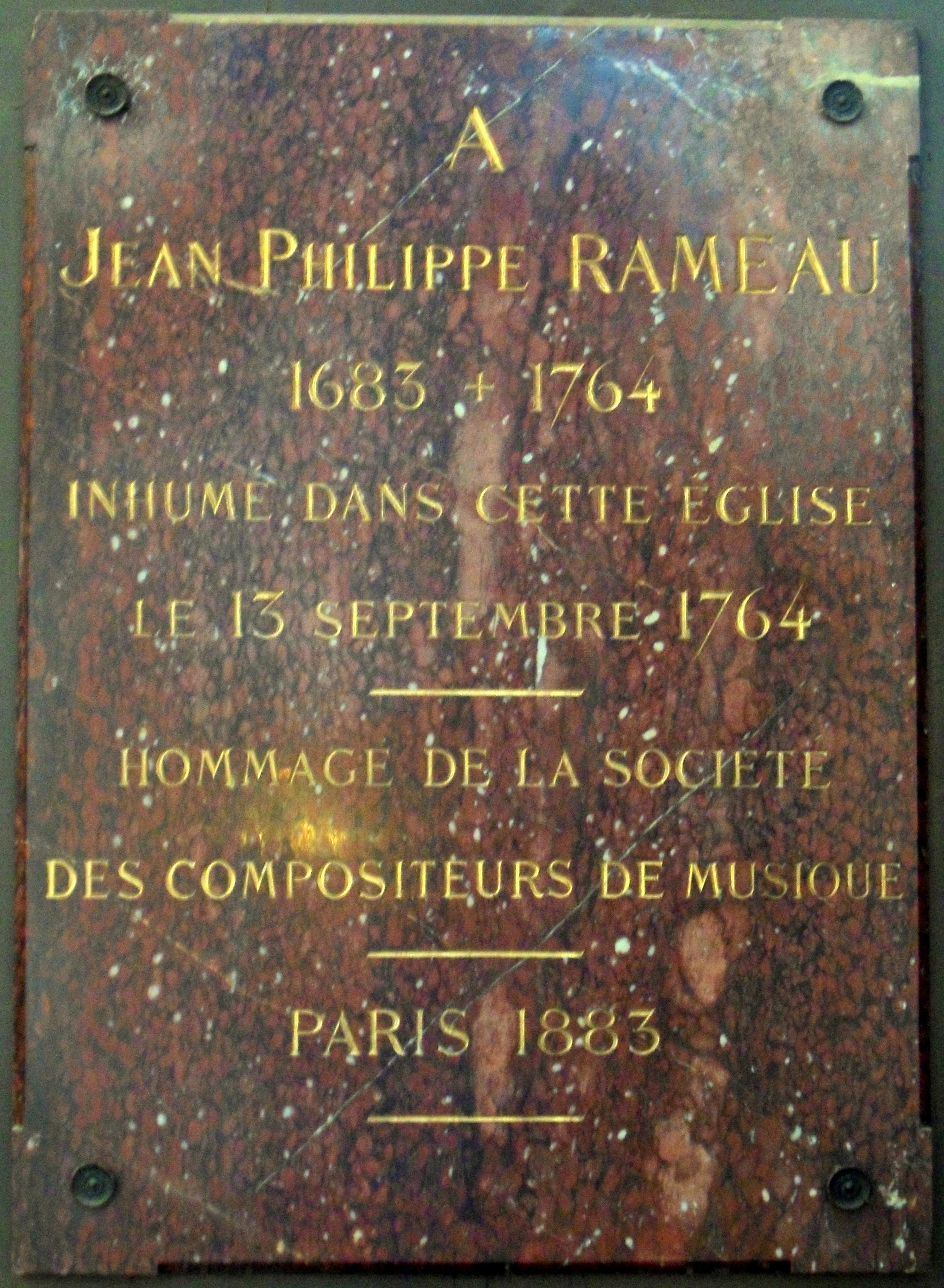 Plaque commémorative posée en 1883 à l'occasion du bicentenaire de la naissance de Jean-Philippe Rameau